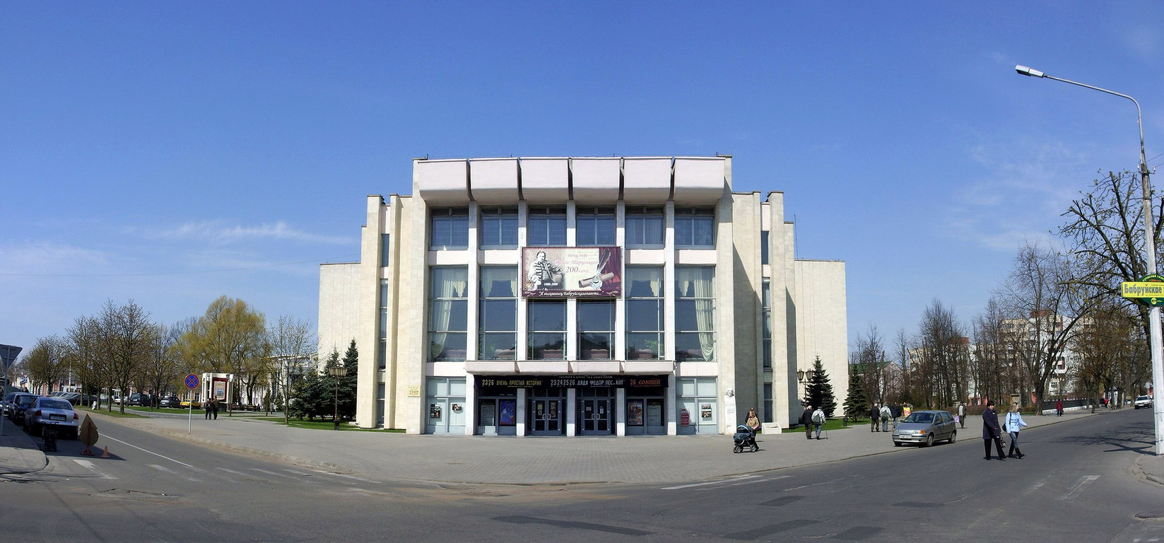 Фасад Бобруйского театра драмы и комедии им. Винцента Дунина-Марцинкевича